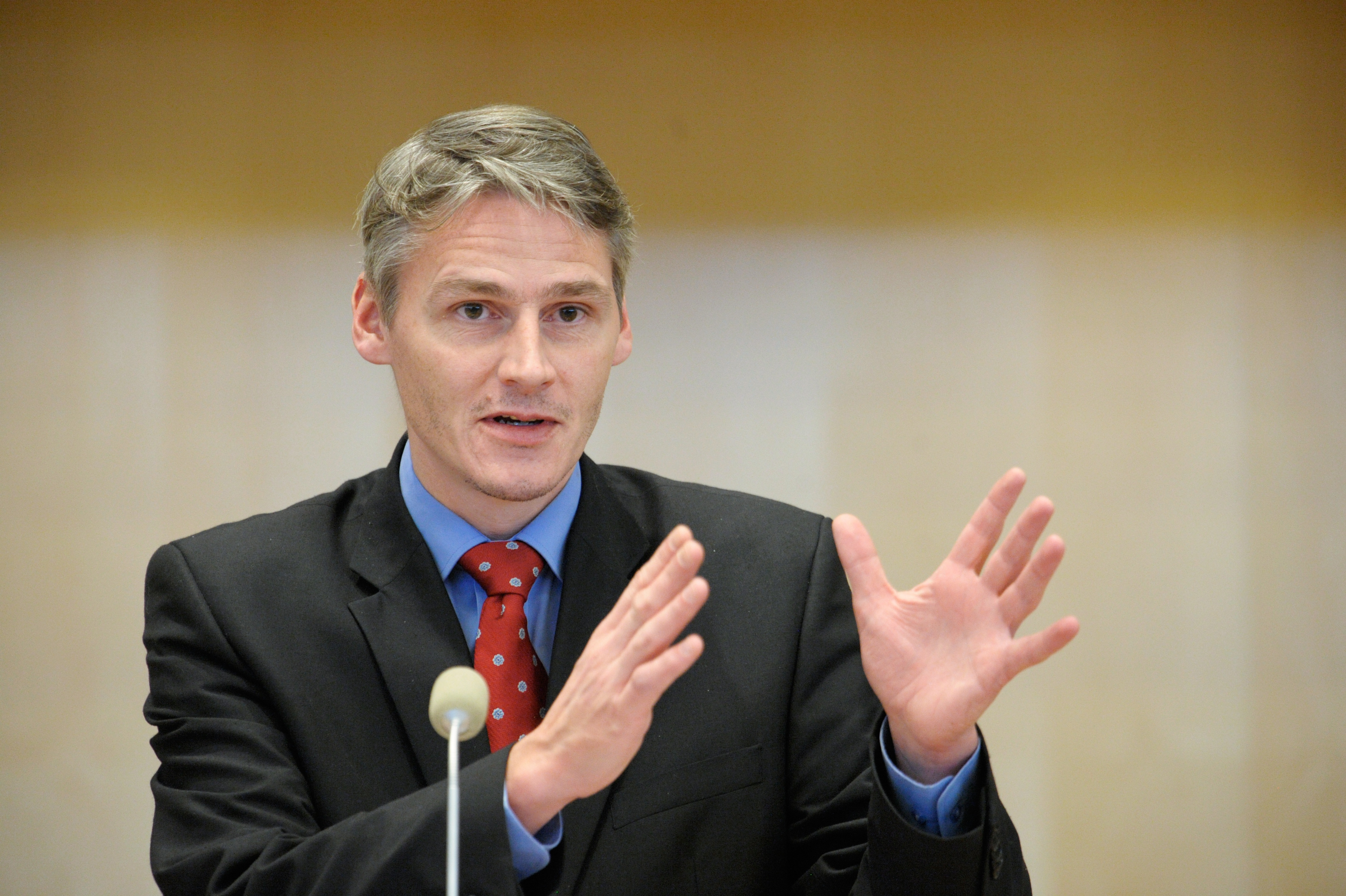 Høgni Hoydal från Färöarna. Nordiska rådets session 2009.